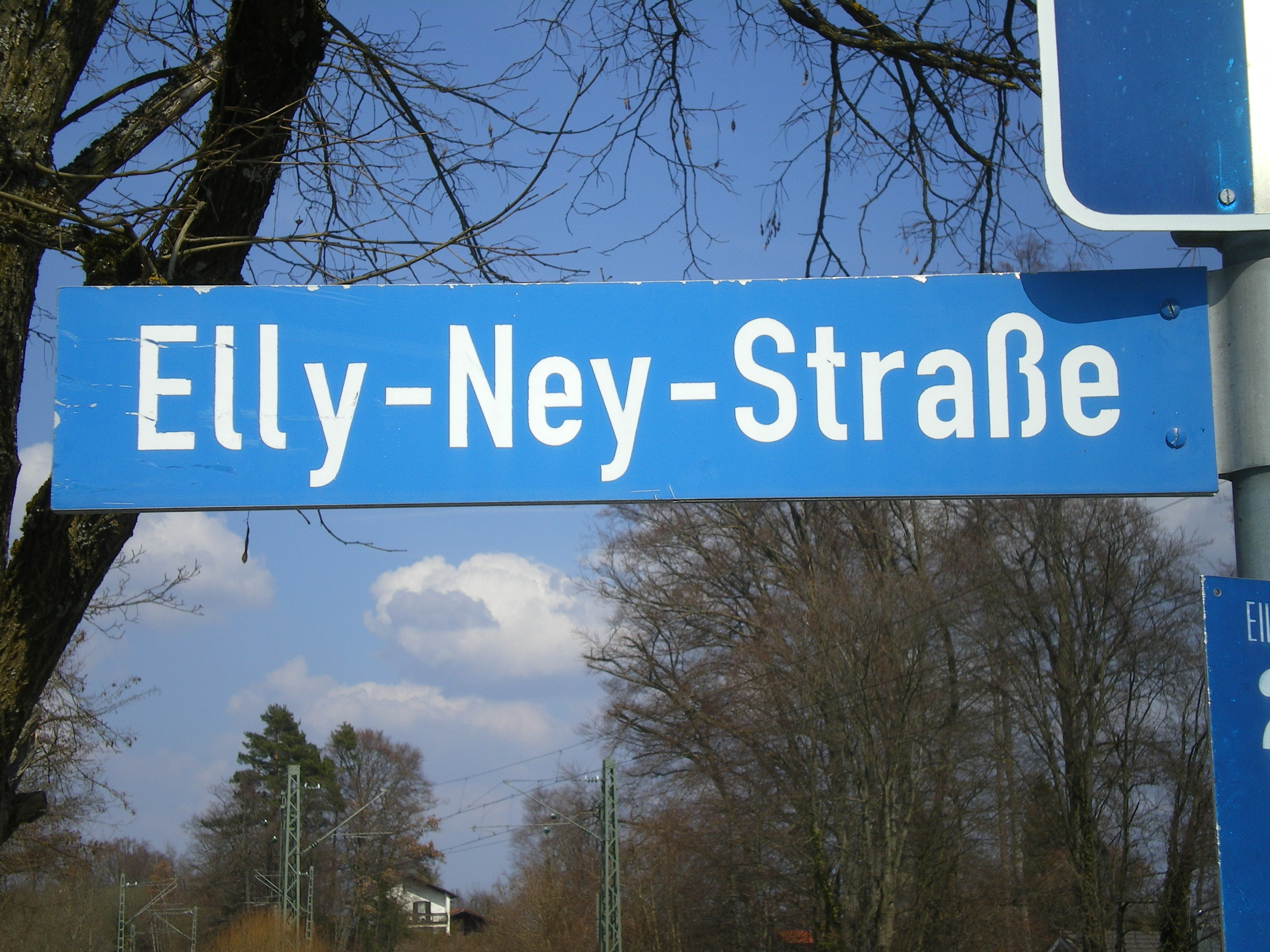 Strassenschild der Elly-Ney-Strasse in Tutzing; April 2009 der Zusatz "Ehrenbürgerin" wurde entfernt